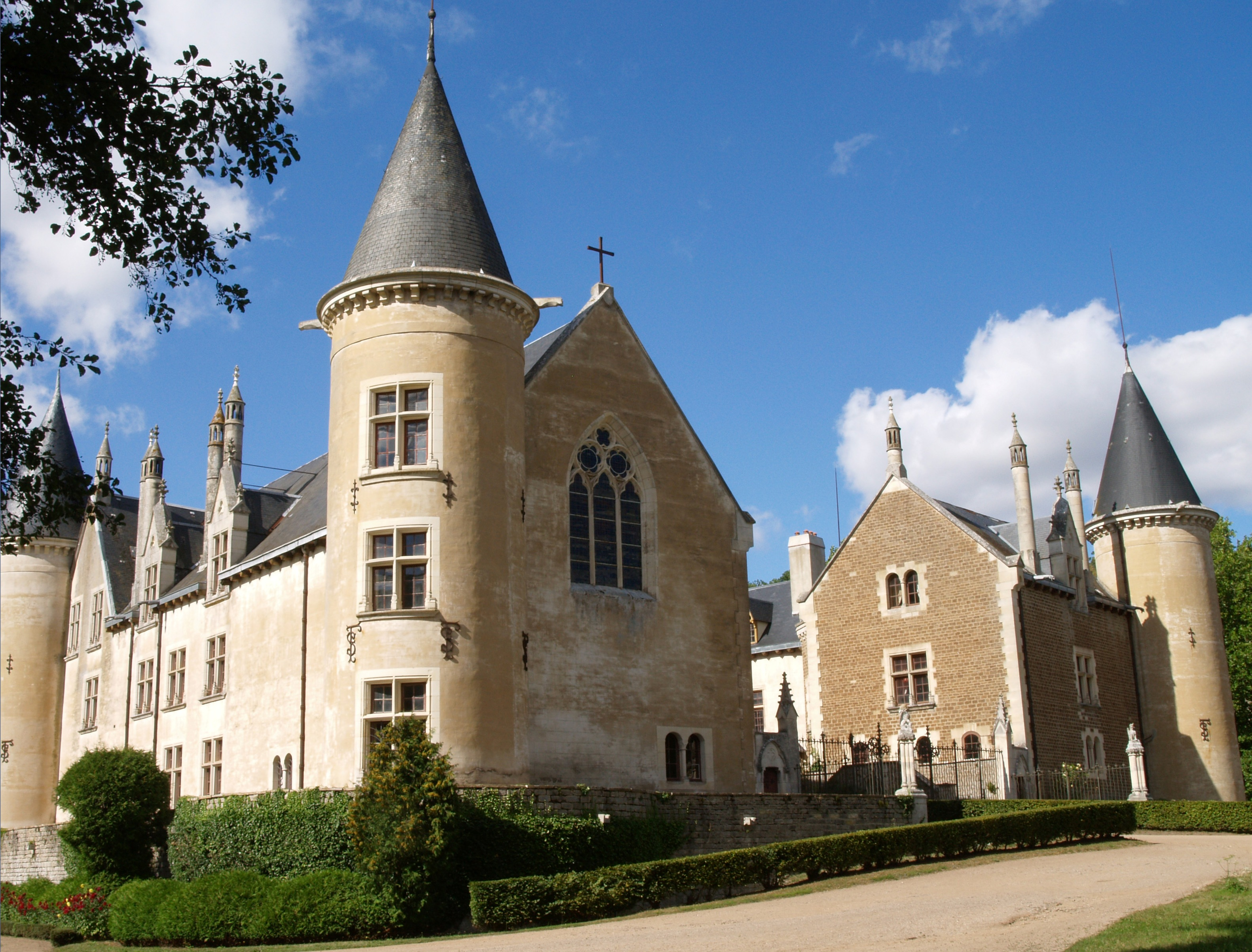 Entrée du château de Bourbilly, en Côte-d'Or.